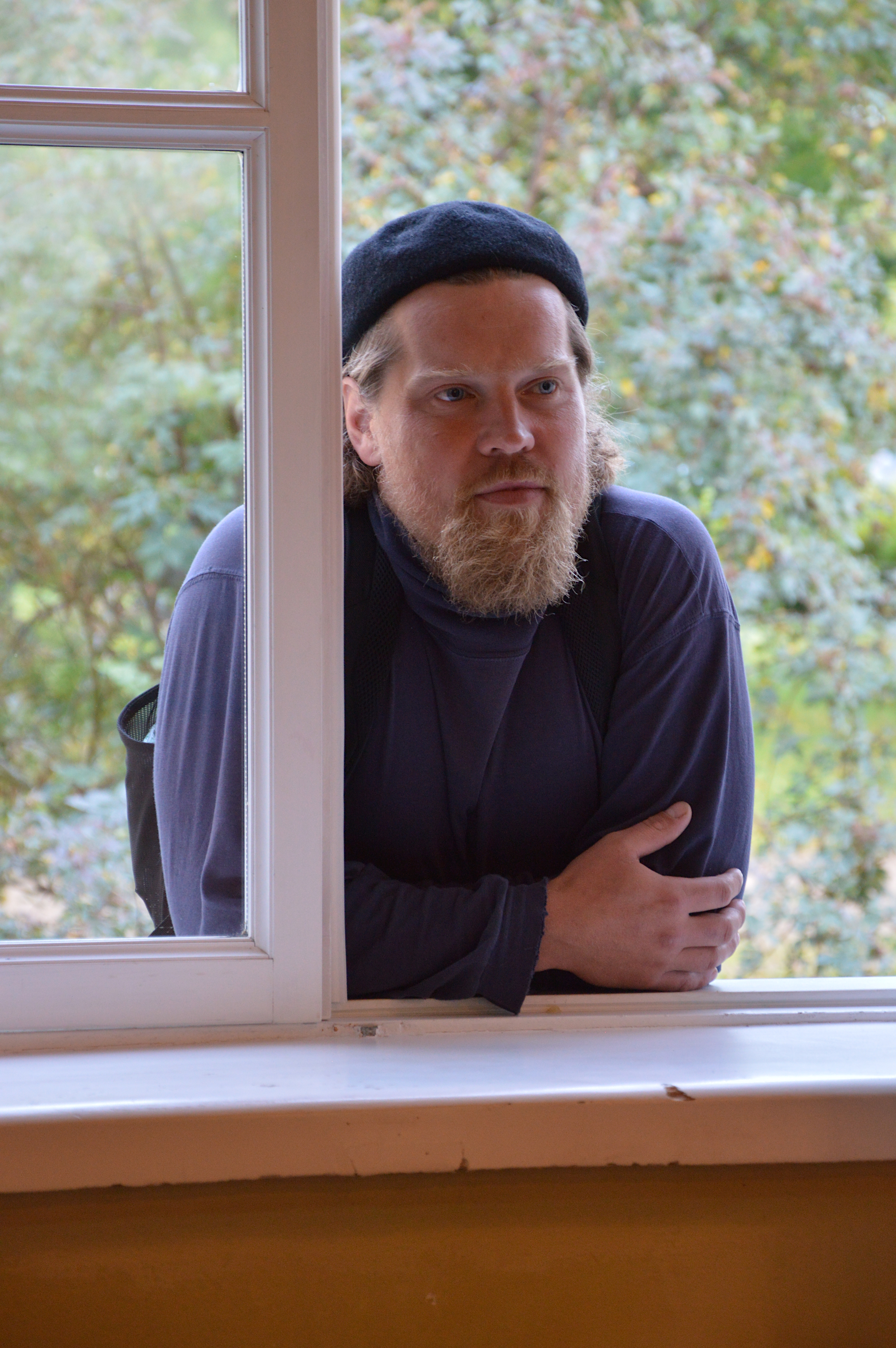 Joosep Matjus 2020. aasta soome-ugri filmifestivalil Sännas.